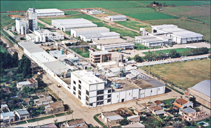 Milkaut